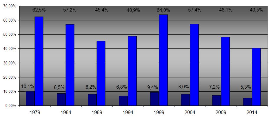 Europawahlergebnisse der CSU 1979 bis 2014, Graphikdatei (Balkendiagramm)